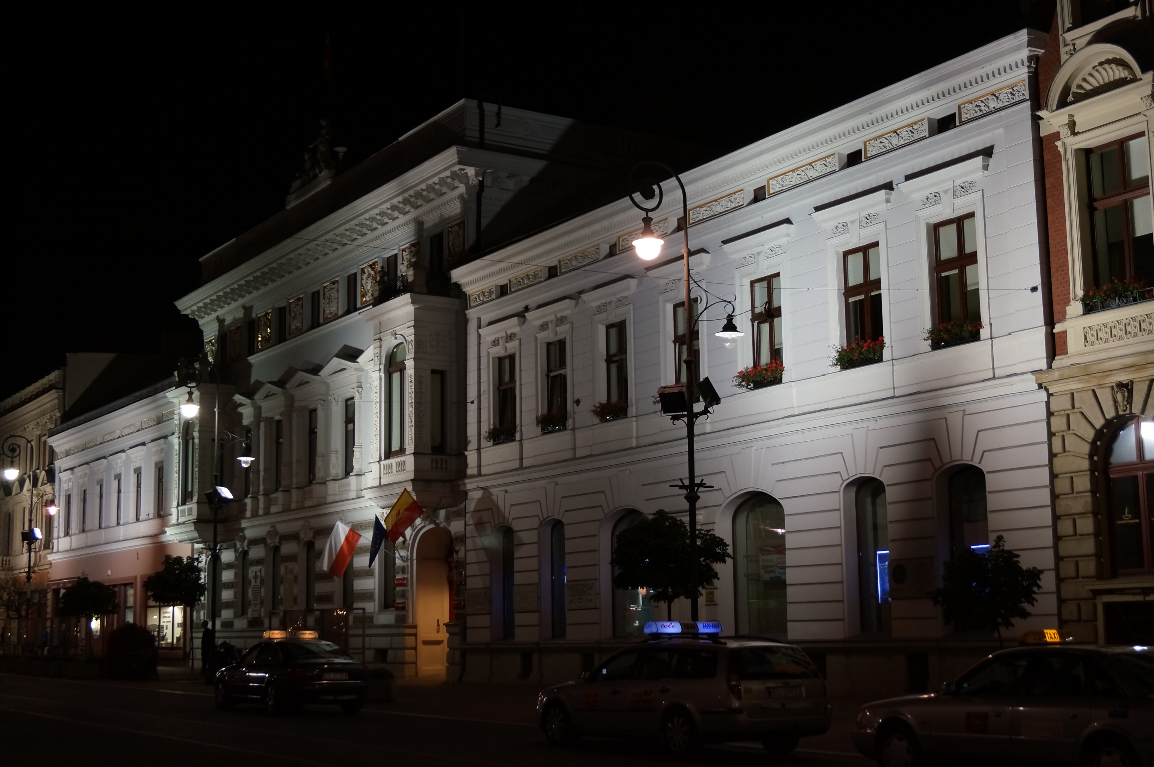 Łódź, pałac Juliusza Heinzla nocą